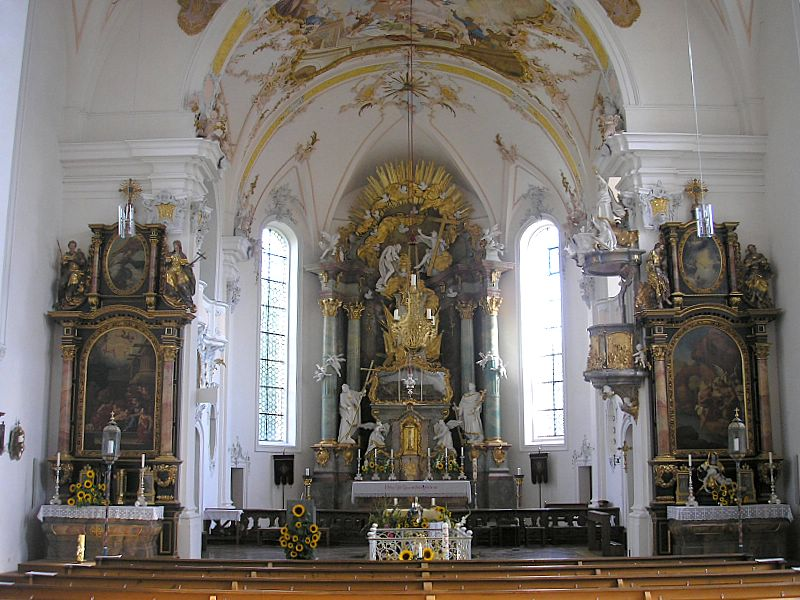 Wallfahrtskirche St. Rasso (Grafrath, Landkreis Fürstenfeldbruck, Oberbayern). Innenraum: Blick zum Chor. Eigene Aufnahme, Sept. 2006 / Pilgrimage church St. Rasso at Grafrath near Fuerstenfeldbruck (Upper Bavaria, Germany).Interior: Looking towards the choir. Own photo, Sept. 2006